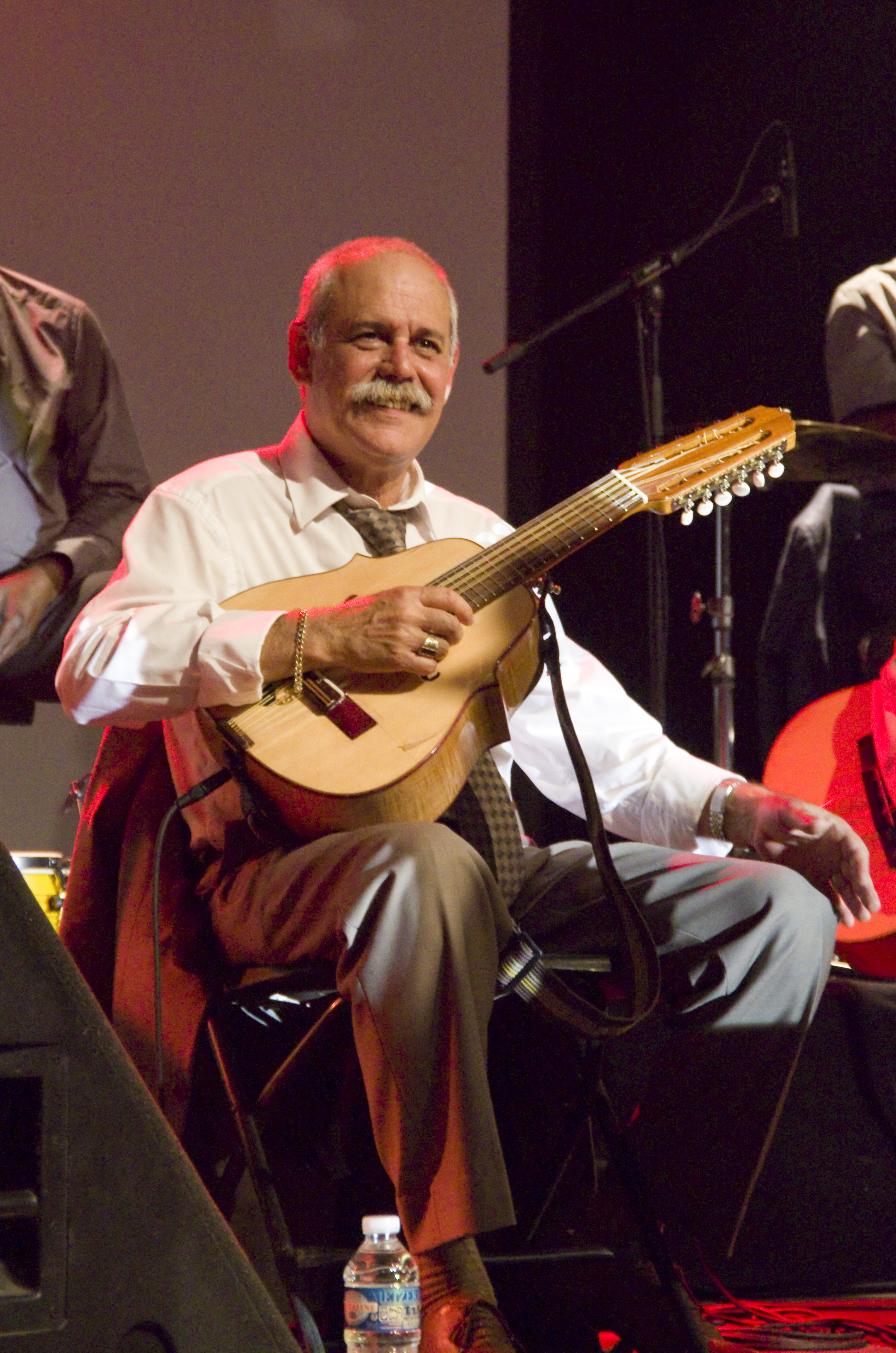 Das Zelt-Musik-Festival 2015 in Freiburg im Breisgau. 06.07.2015 Orquesta Buena Vista Social Club Barbarito Torres